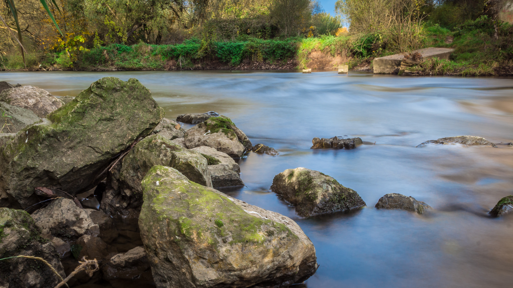 Die Rednitz in Katzwang unter der Bahnbrücke.